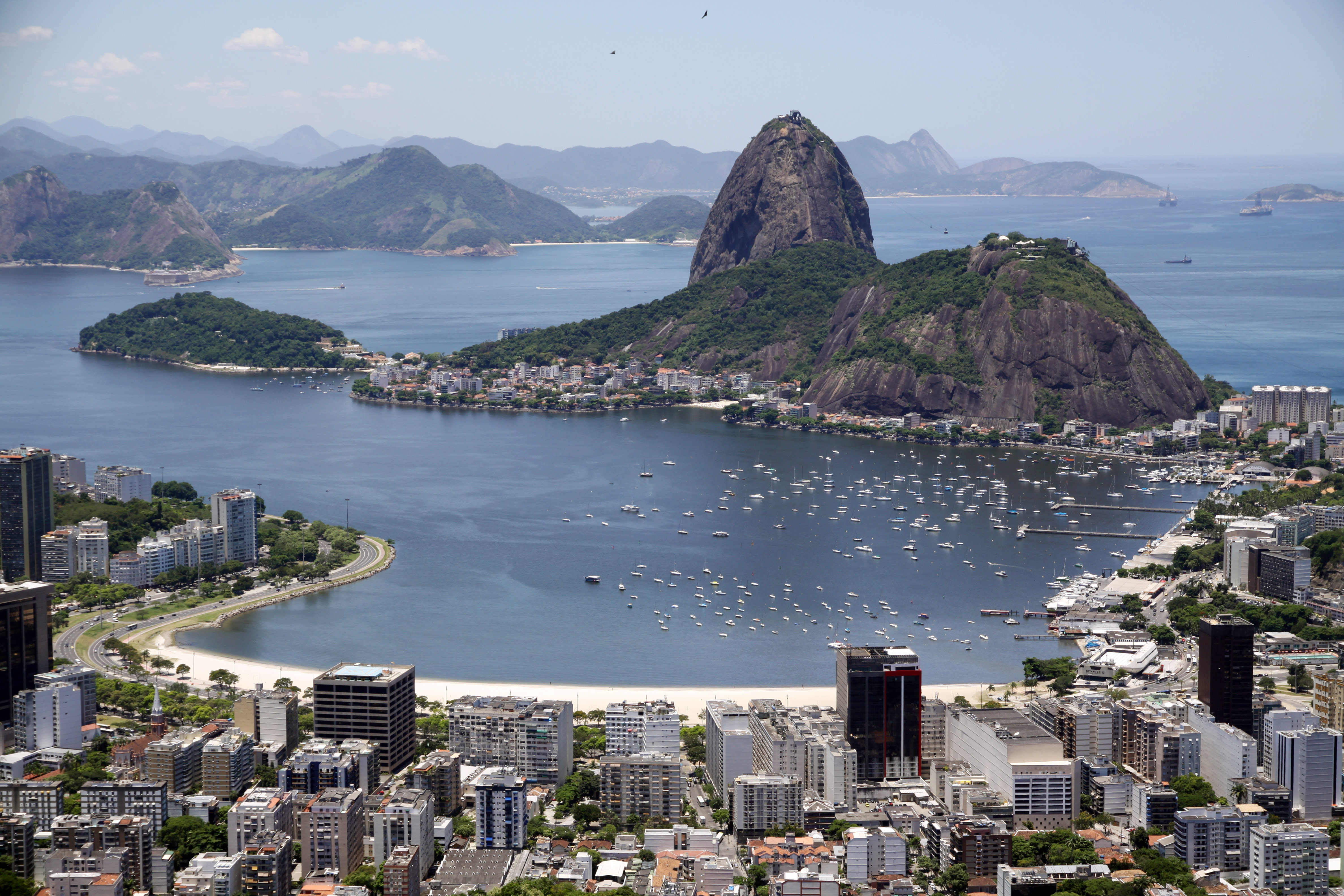 Enseada de Botafogo e Pão de Açúcar vistos do Mirante de Dona Marta.